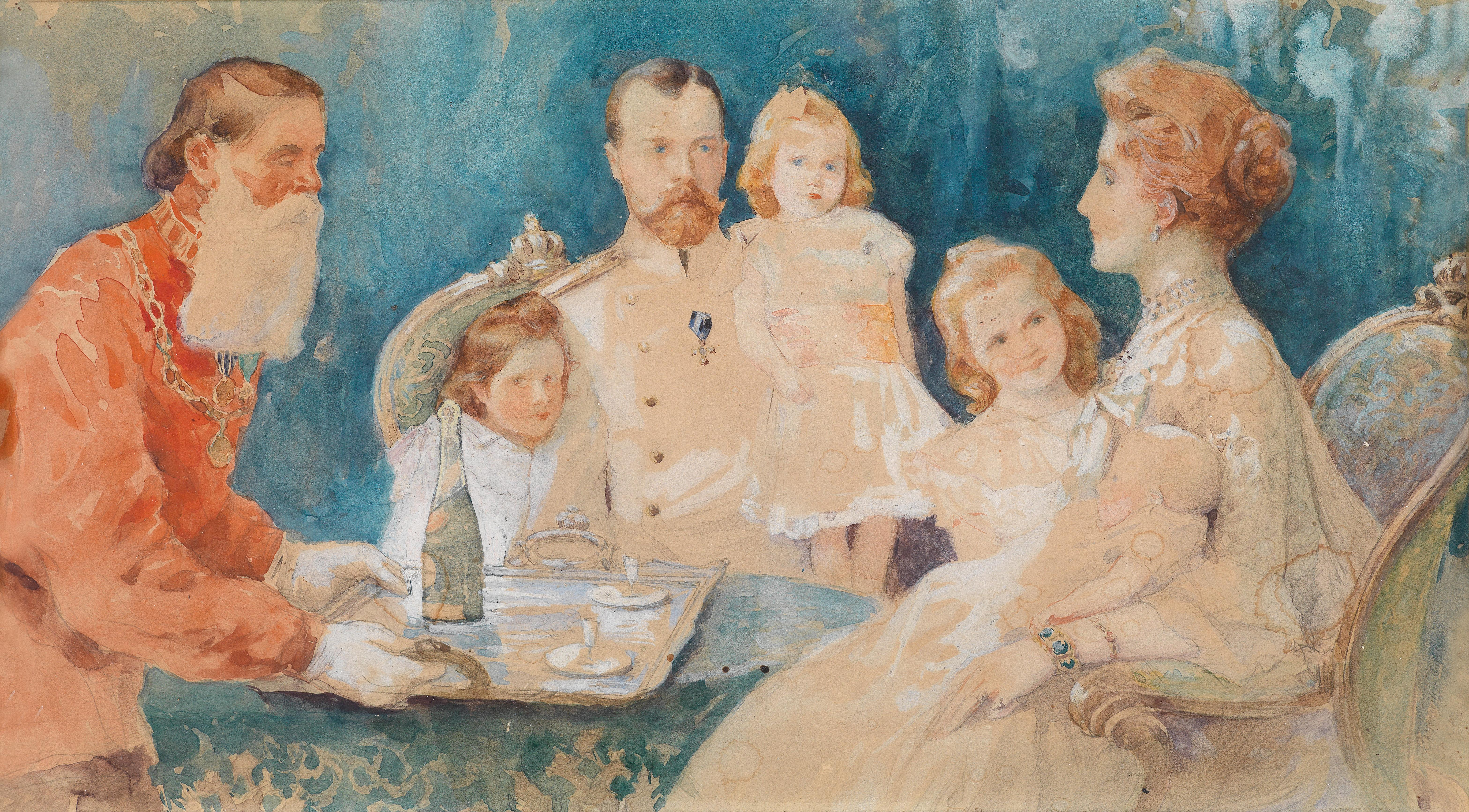 Zar Nikolai II. und Zarin Alexandra Fjordorovna mit ihren Töchtern Olga, Tatiana, Maria und Anastasia (als Baby), datiert 1902, Aquarell über Bleistift, weiß gehöht auf Halbkarton, 18 x 31 cm